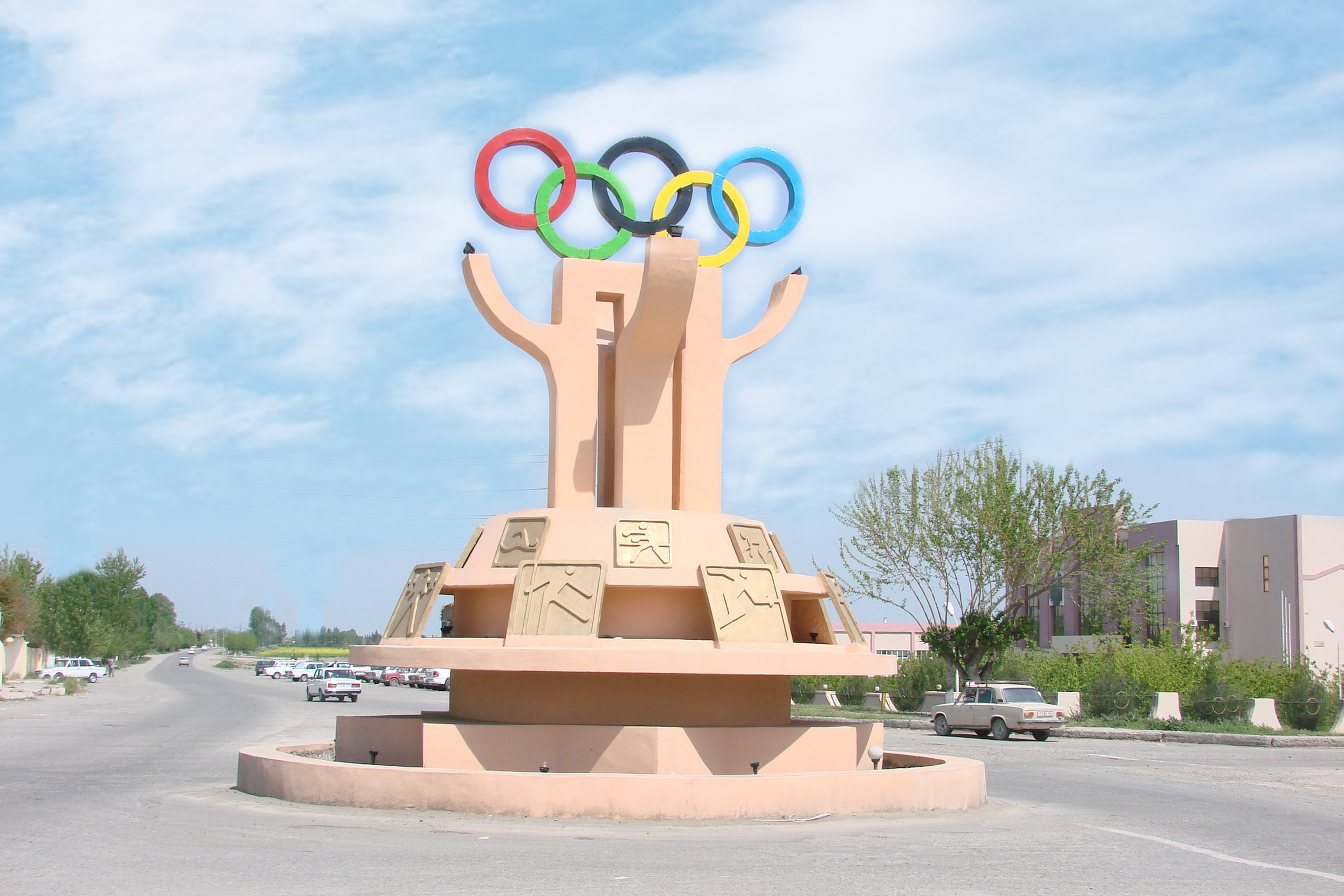 Bərdə Olimpiya Kuruqu